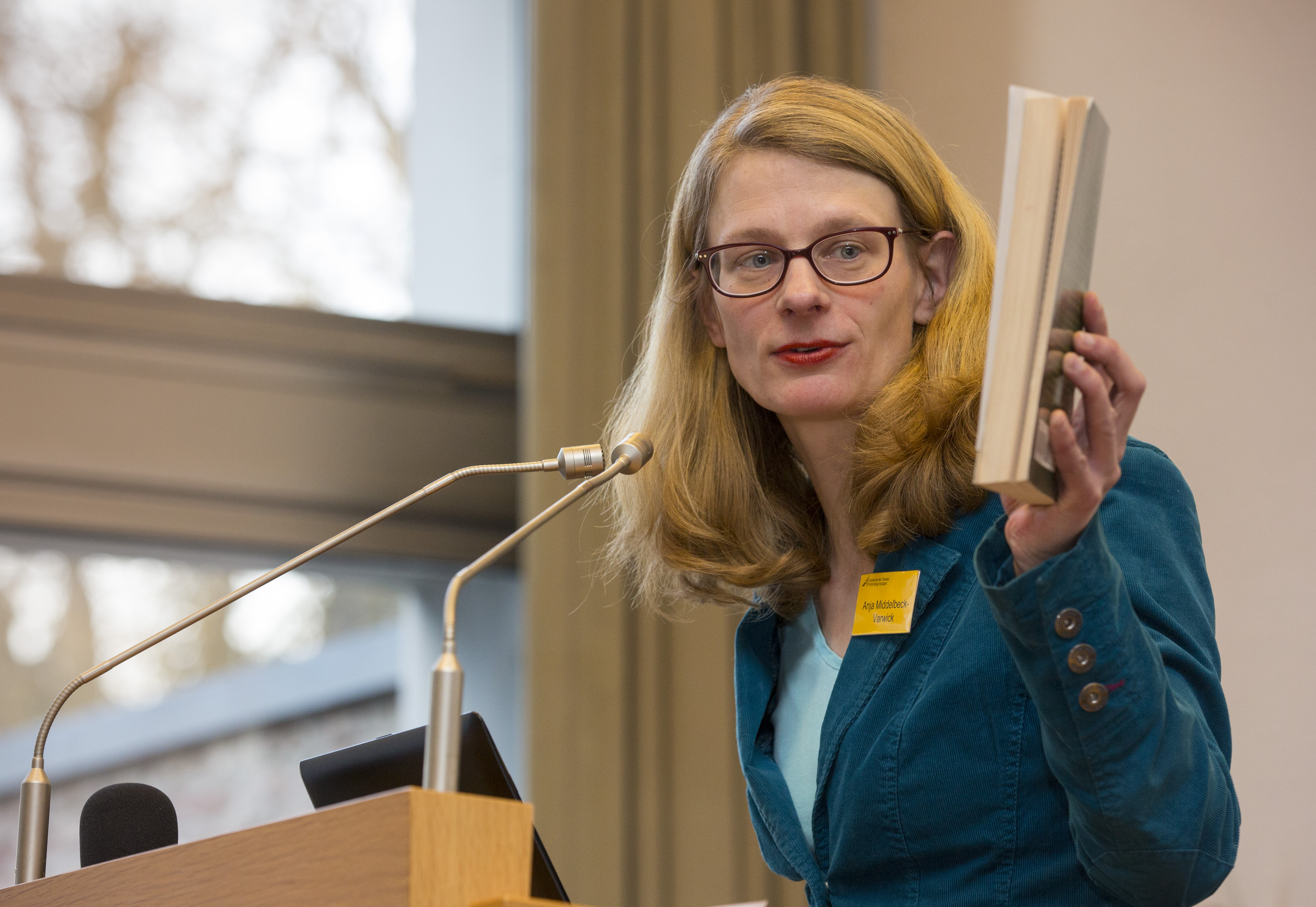 Aufgenommen beim Theologischen Forum Christentum-Islam, Stuttgart